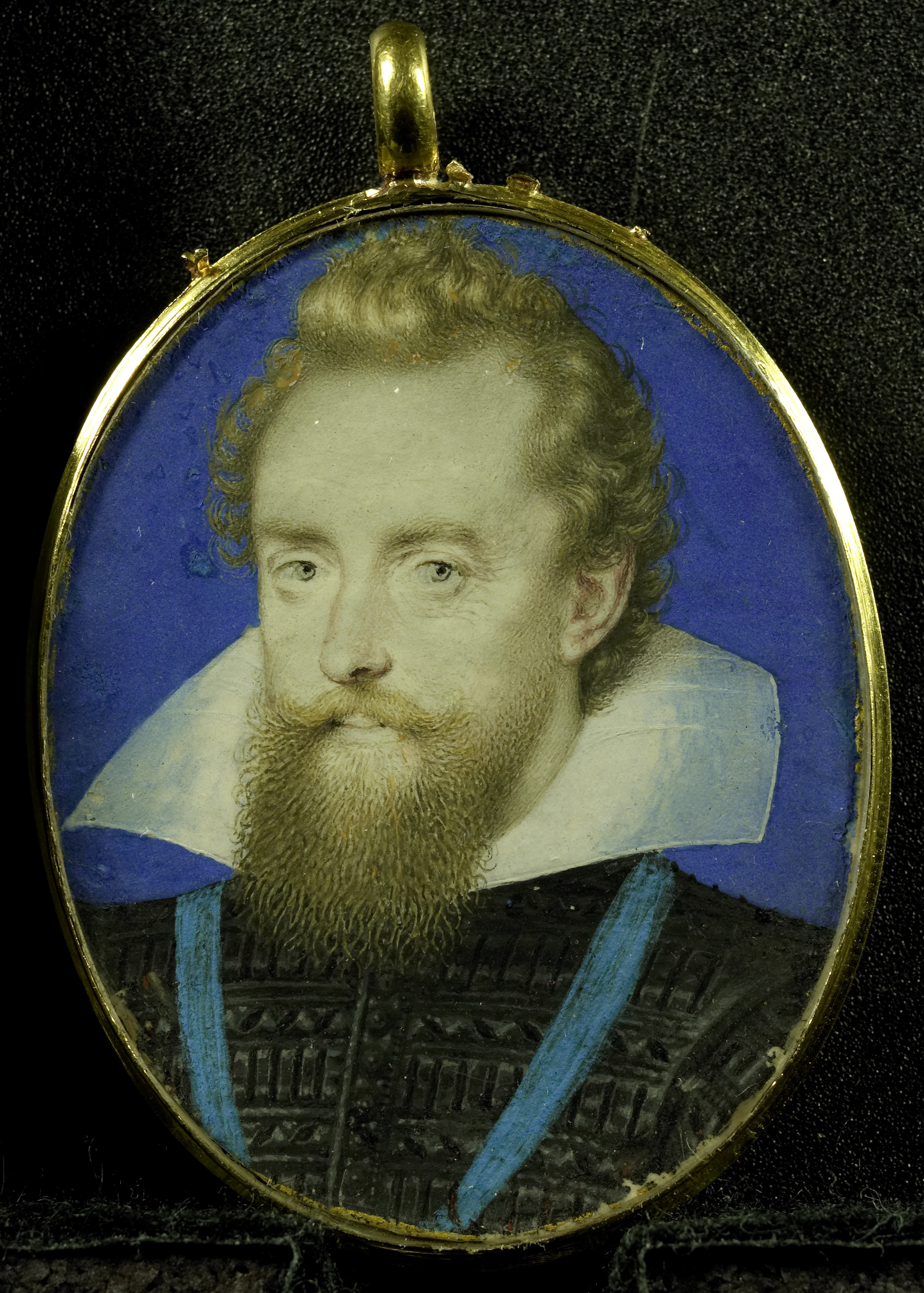 Portret van Ludovic Stuart (1574-1623/1624), eerste hertog van Richmond en tweede hertog van Lennox of van Thomas Howard (1561-1628), graaf van Suffolk. Buste, naar links.